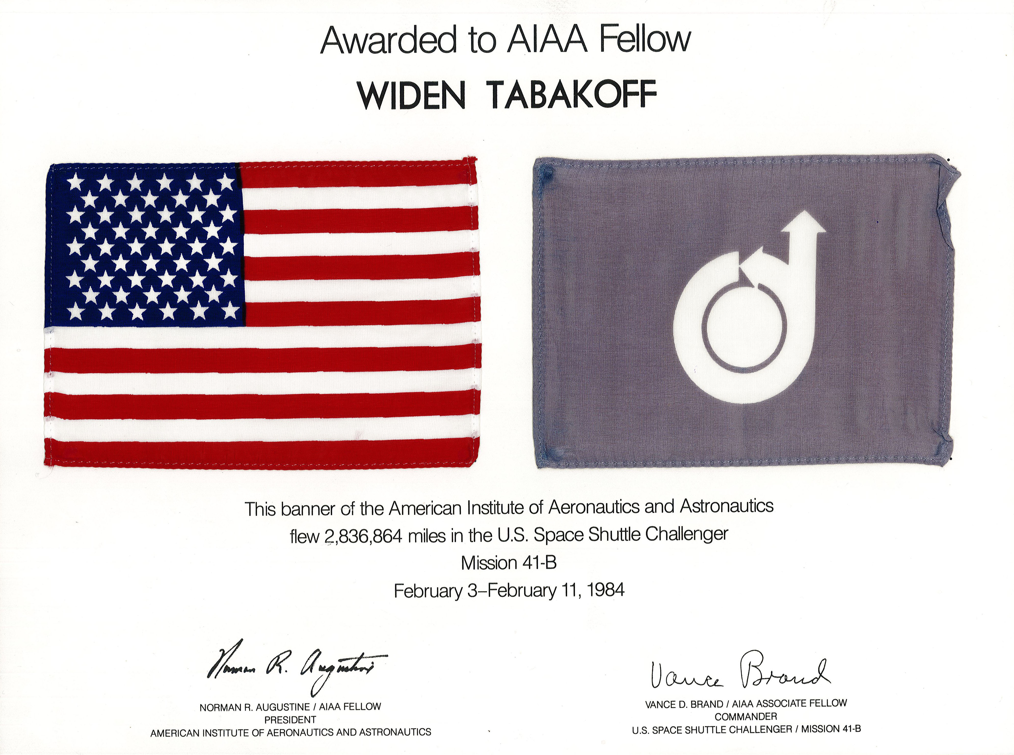 Знамена, подарени на проф. Табаков като признание за приноса мъ към НАСА